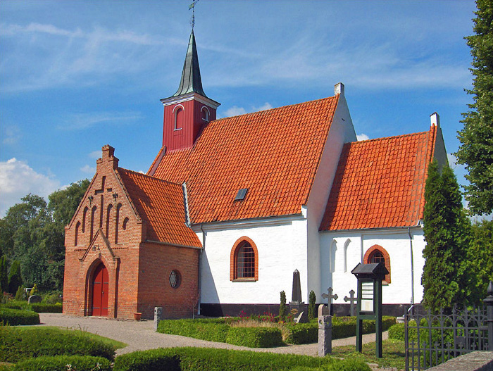 fra sydøst